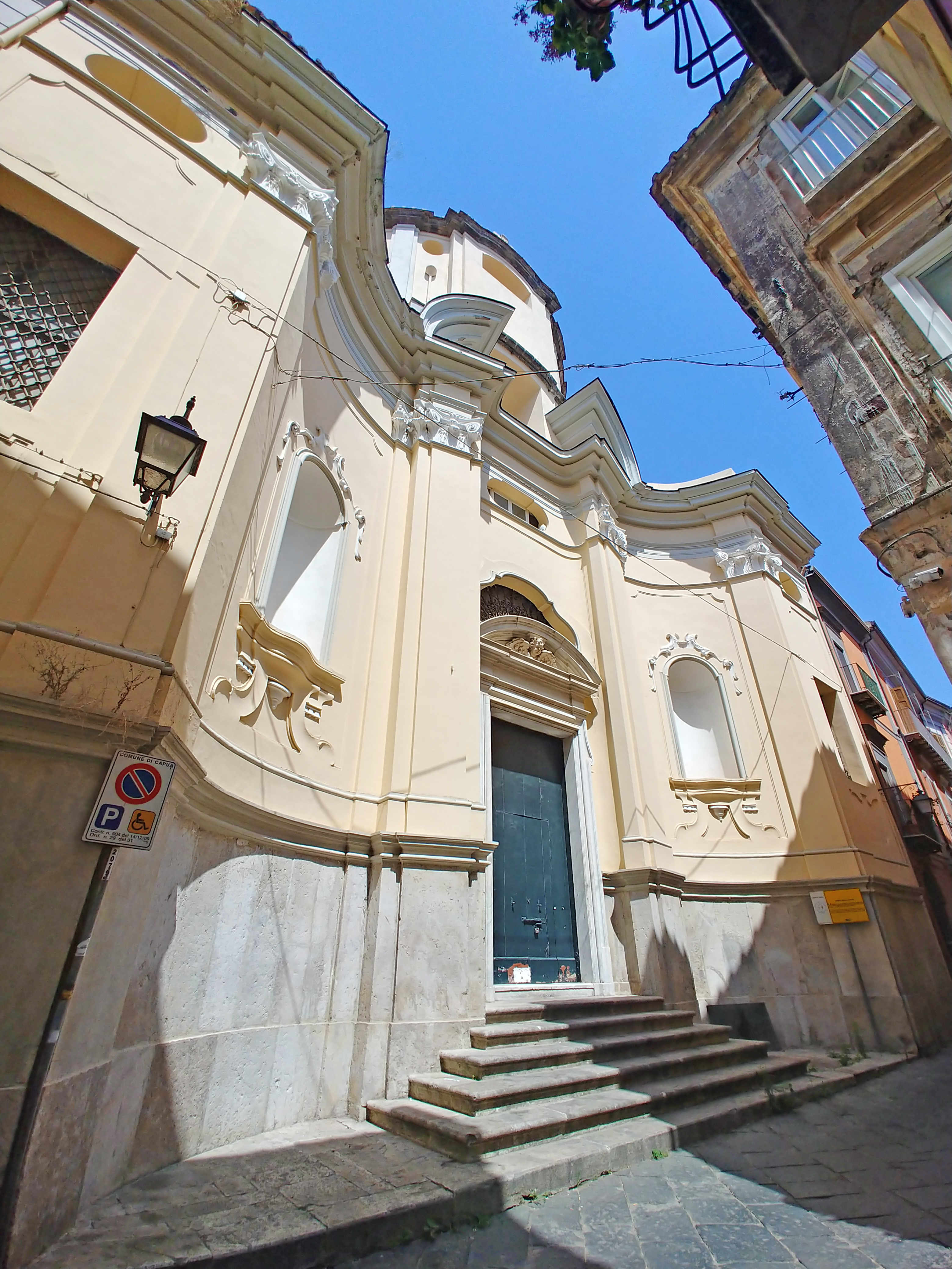 Facciata.